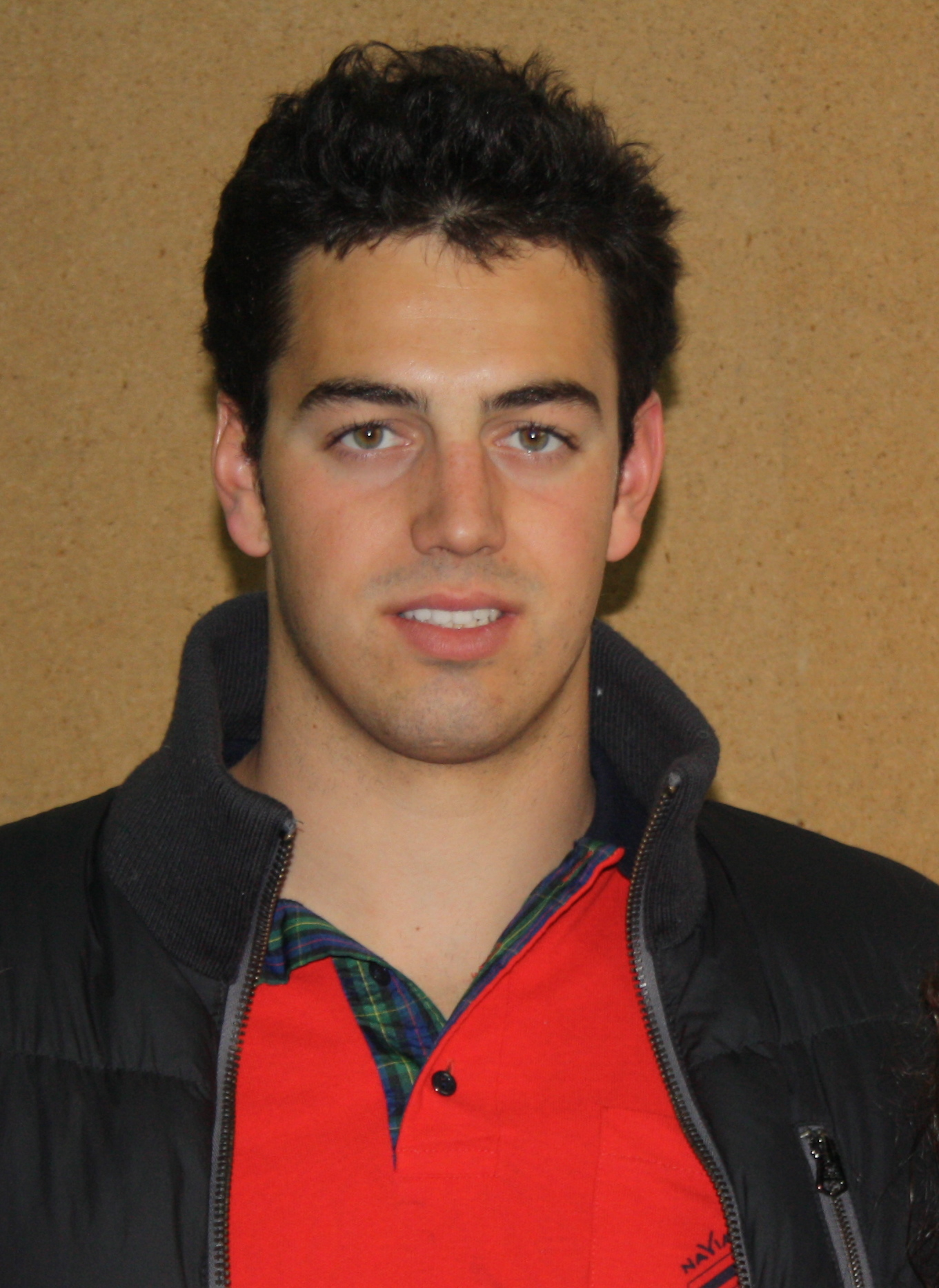 rafael muñoz en la competicion de natacion de absolutos de cadiz 2010